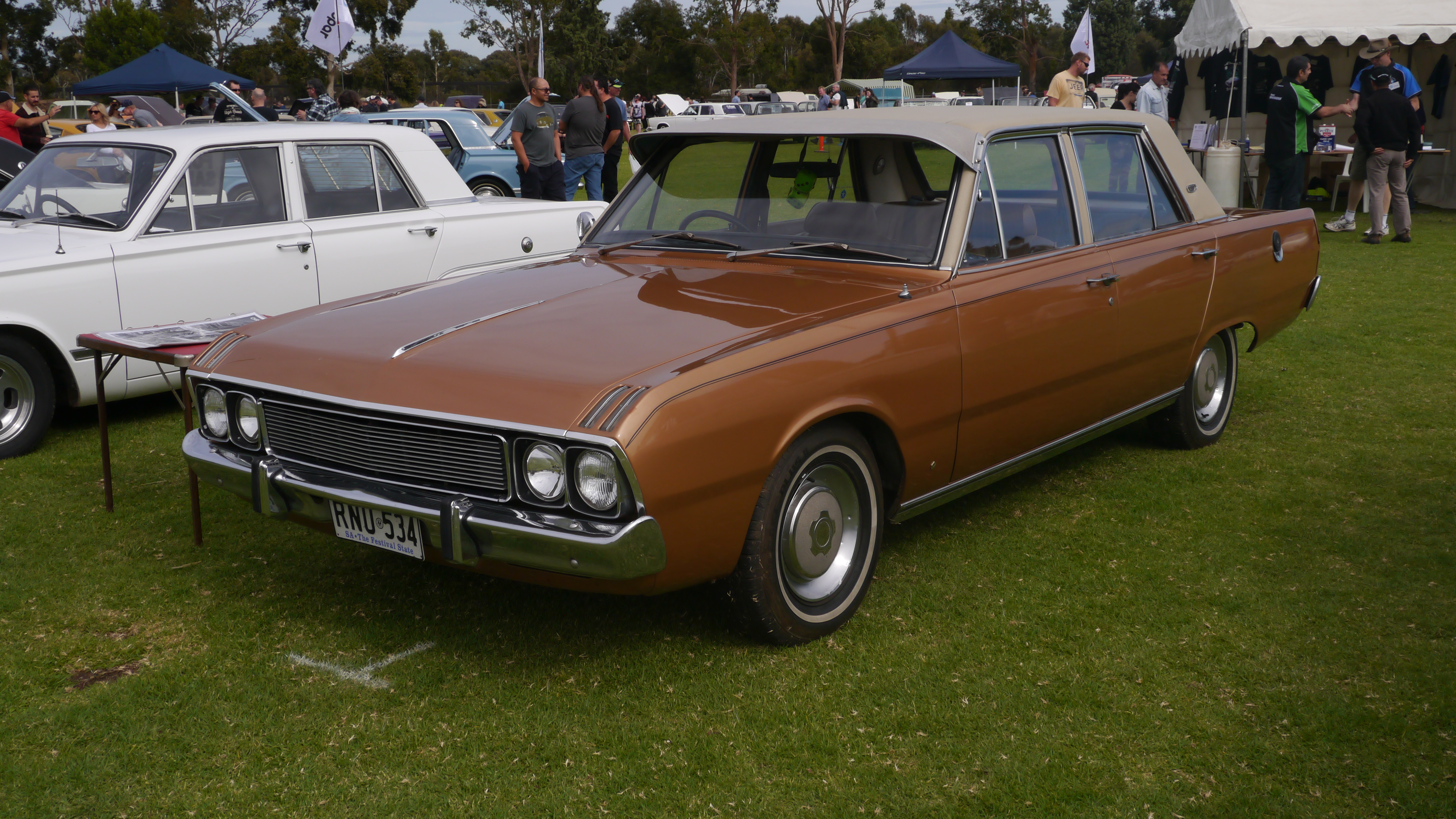 Chrysler VIP VG Series